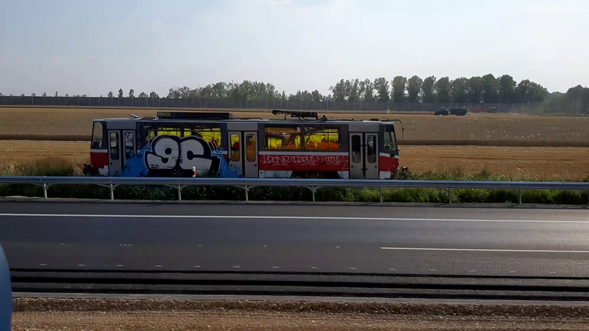 Odstavená tramvaj T6A5 v ochranném pásmu dálnice D1 u Průhonic. Objevila se zde 14. května 2019. Tramvaj byla údajně zakoupena společností Domo Development, která má v úmyslu v okolí dálnice vybudovat obchodní zónu. Fotografie pořízena při cestě autobusem z Brna do Prahy (Samsung SM-A750FN, 7.8.2020). Play media Video natočeno během cesty z Prahy do Brna (Samsung SM-A750FN, konvertováno z .mp4 na .ogv pomocí služby convertio.co, 10.8.2020). Výřez z videa, vyříznuto pomocí programu VLC media player (Samsung SM-A750FN, 10.8.2020).